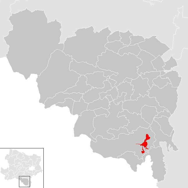 Bezirk Neunkirchen